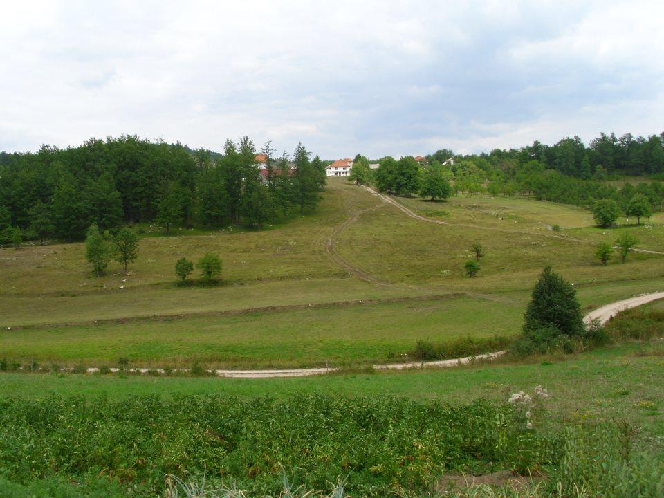 Рађевићи- Трговиште